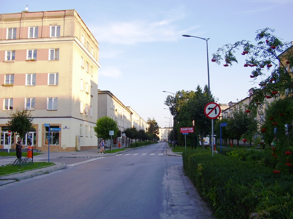 Nowa Dęba, ul. Birthplace of Ewa Rzepka-Morales. Jana Pawła II, 2011-08-05